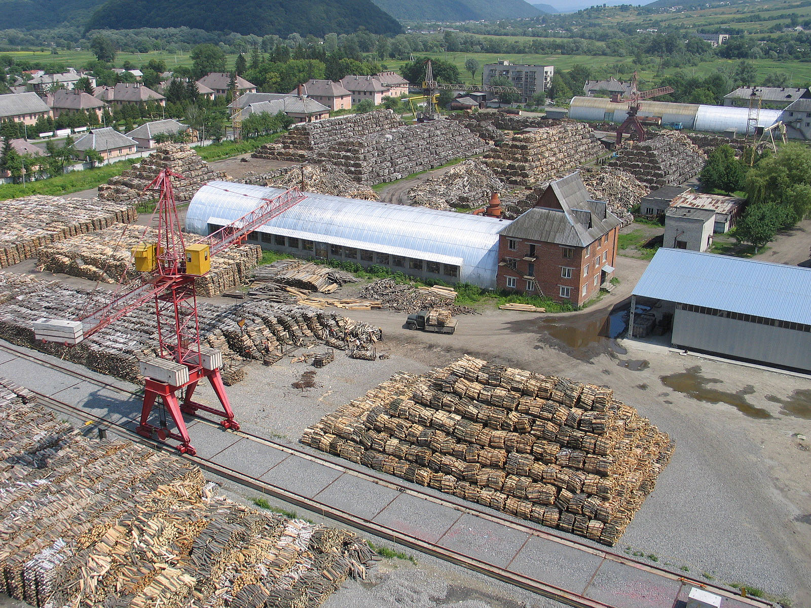 Масштаби виробництва заводом